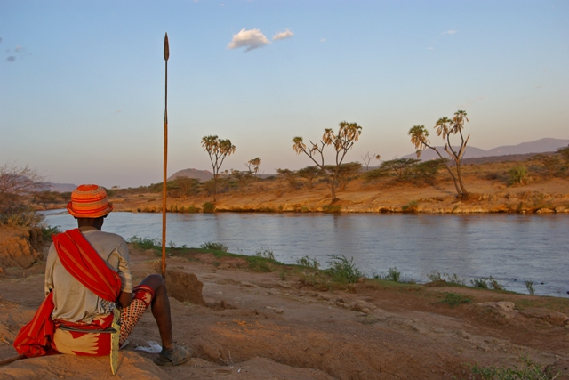 Watchman devant la rivière Uaso Nyiro - documentaire Umoja, le village interdit aux hommes de Jean Crousillac et Jean-Marc Sainclair.